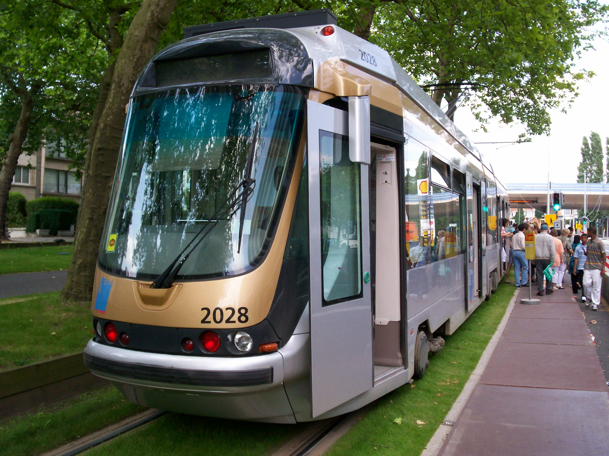 T 2000 de la ligne 94 au terminus Hermann-Debroux